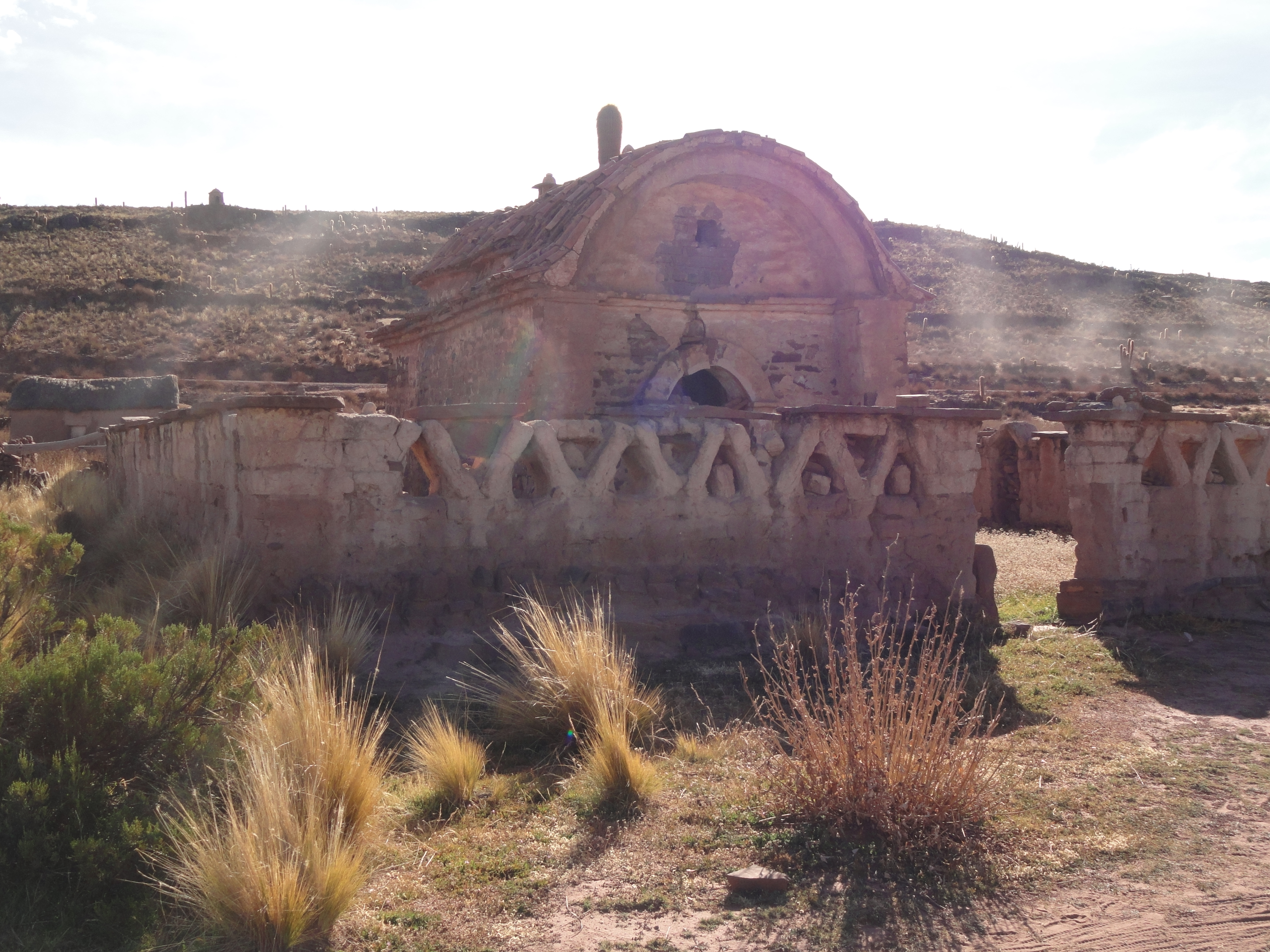 Templo de Jancokala This medium shows the protected monument with the number O/00-014 in Bolivia.